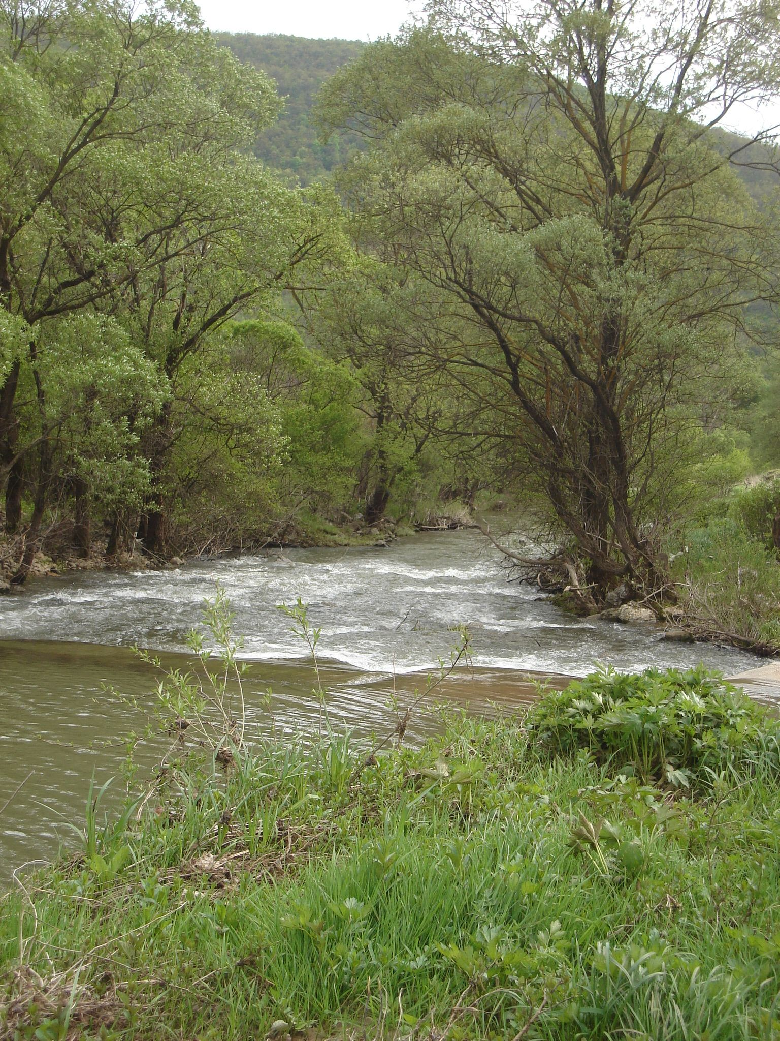 Река Нишава (Гинска) в края на пролома преди село Калотина.